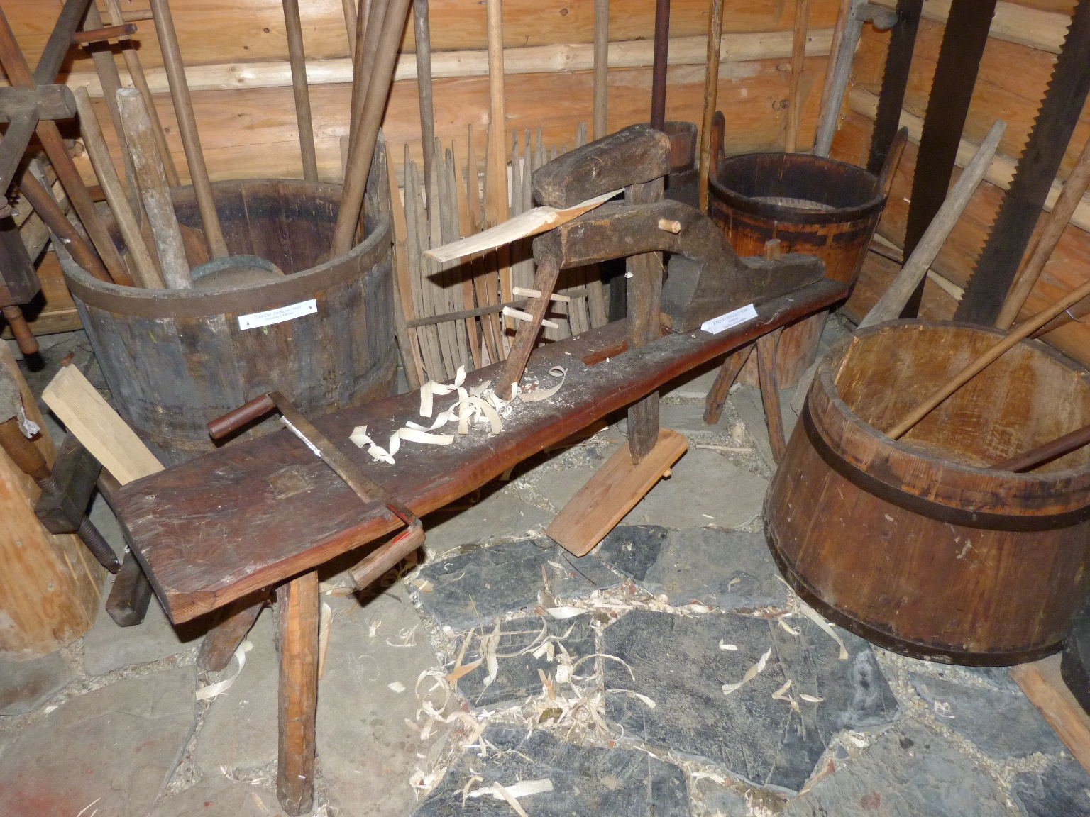 Muzeum dřevěného porculánu - strýcova stolica na výrobu šindele